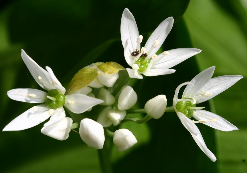 Allium ursinum ENBLA01